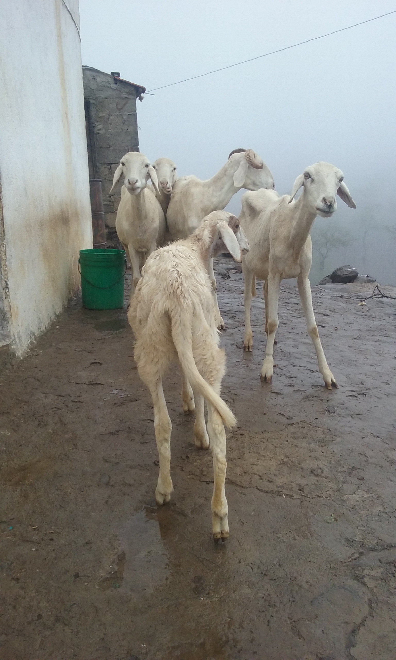 Cette image représente une bande de moutons retardant le chanement du temps devant chez ma grand-mère This is an image with the theme "Africa on the Move or Transport" from: Cape Verde